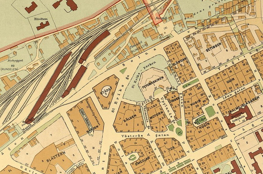 Del av Stockholmskartan för Vasastan visande dagens Kvarteren Motorn, Vingen, Flygmaskinen.